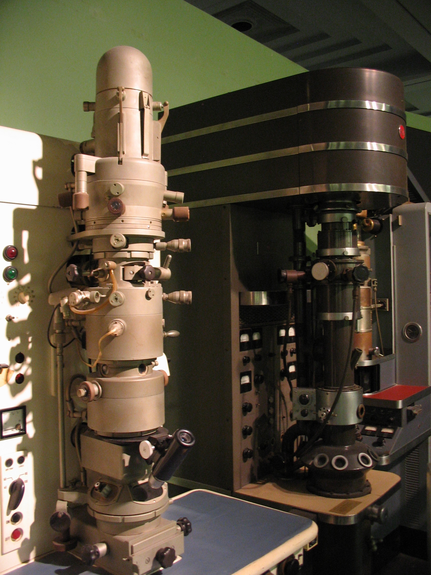 Electron microscopes